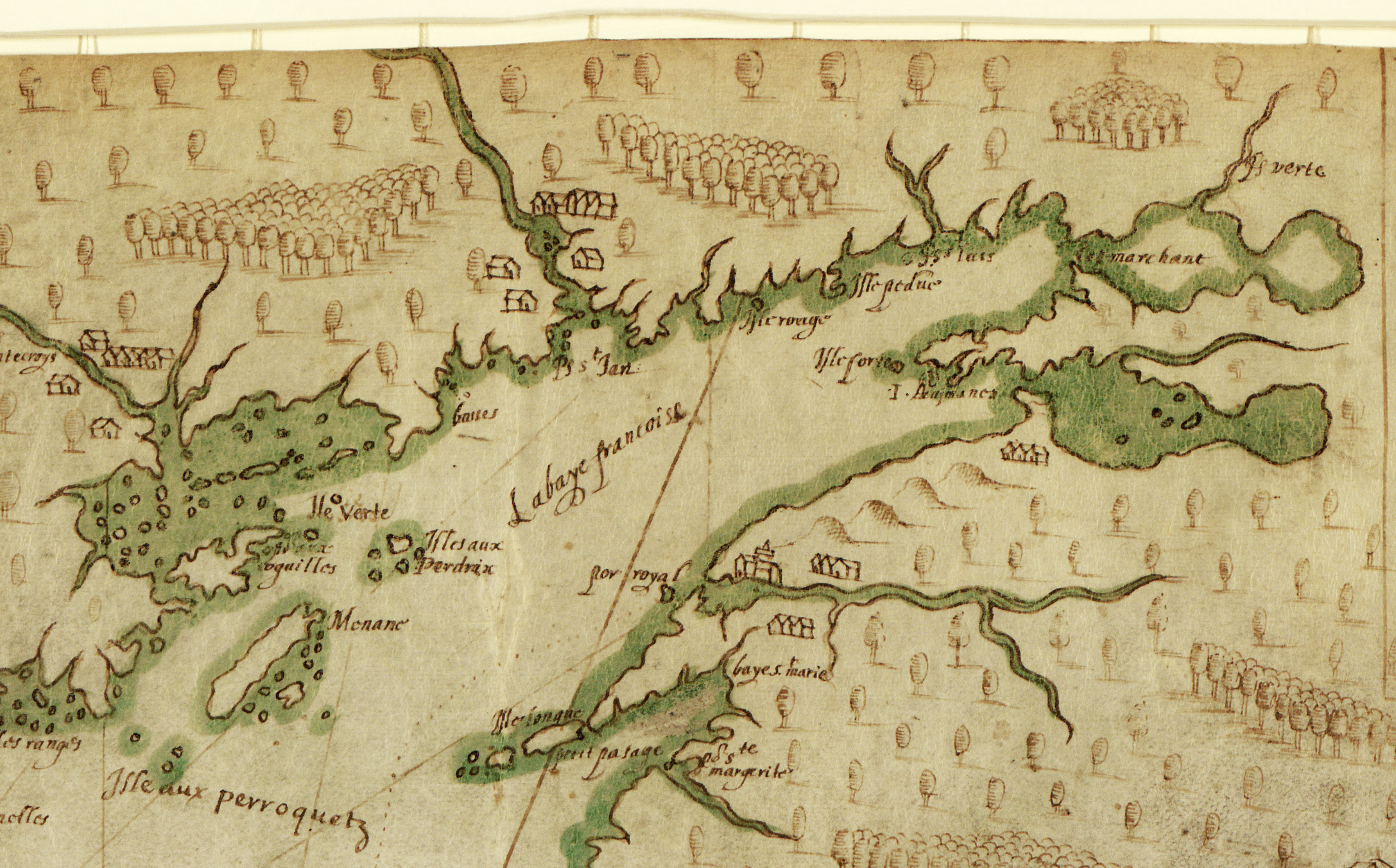 Détail d'une carte sur vélin de style portulan, dessinée par Samuel de Champlain, fondateur de la Nouvelle-France. Il s'agit d'un des grands trésors cartographiques d'Amérique ; la carte offre la première délimitation approfondie de la Nouvelle-Angleterre et des côtes canadiennes. Ce détail montre Port-Royal ; la Baie Françoise (de Fundy), l'île longue. Les noms des lieux et la ligne côtière correspondent de très près au récit de Champlain dans ses Voyages, publiés en 1613. Champlain a personnellement conçu et dessiné la carte. Champlain a fondé ce travail entièrement sur ses propres travaux d'exploration et d'observation, incluant ses entretiens avec des Indiens (sauvages ), ainsi que sur ses propres calculs. La carte montre des habitations le long de la côte, à la fois des établissements français et des villages indiens. Les symboles de colline indiquent des élévations visibles de la côte. Les hauts-fonds dangereux sont indiqués comme des groupes de petits points, et les ancres représentent des endroits où il a jeté l'ancre. Côte atlantique (Amérique du Nord); Provinces Maritimes; Cartes marines.